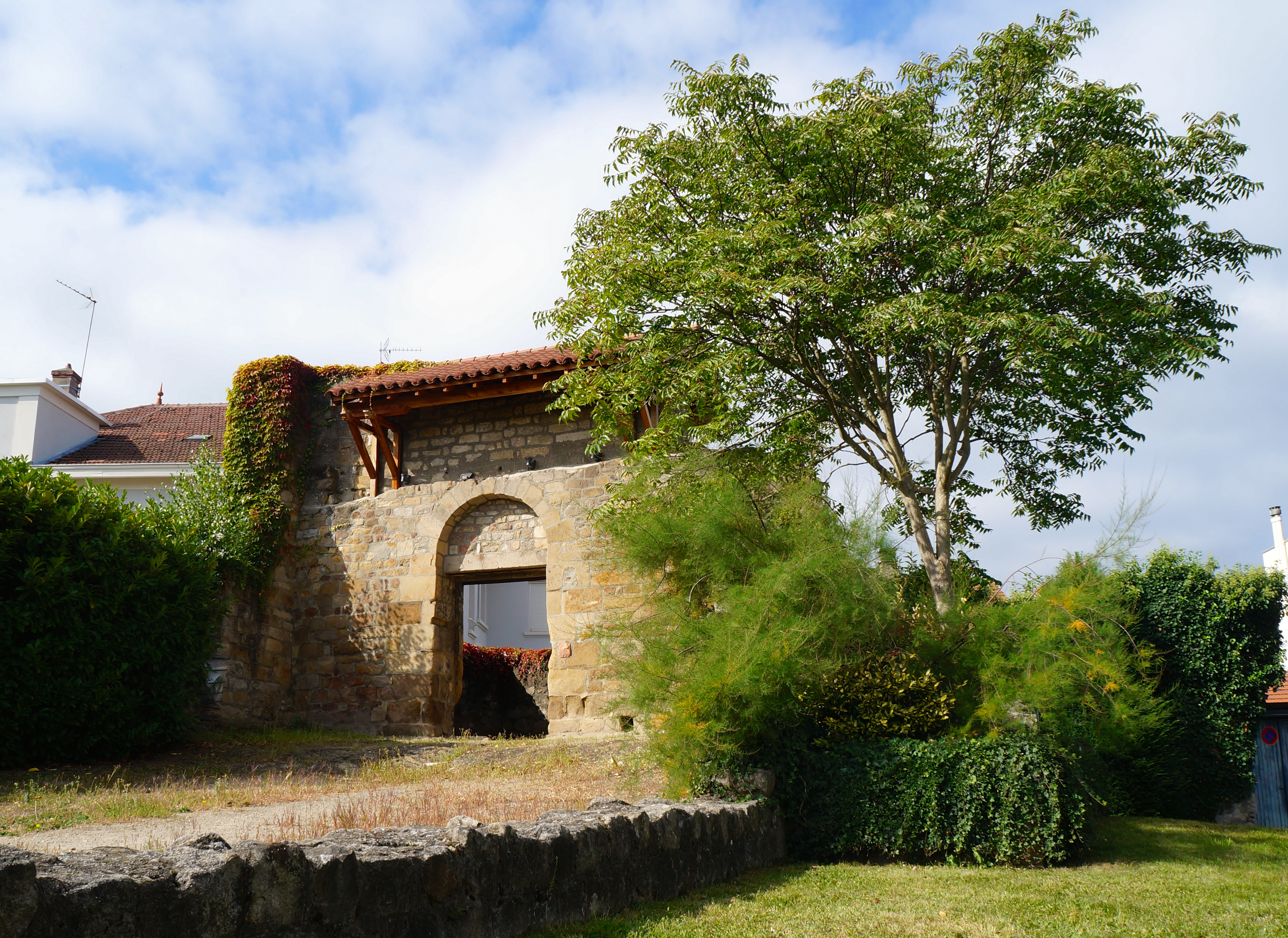 Porte Saint-Pierre, à Firminy dans la Loire. .